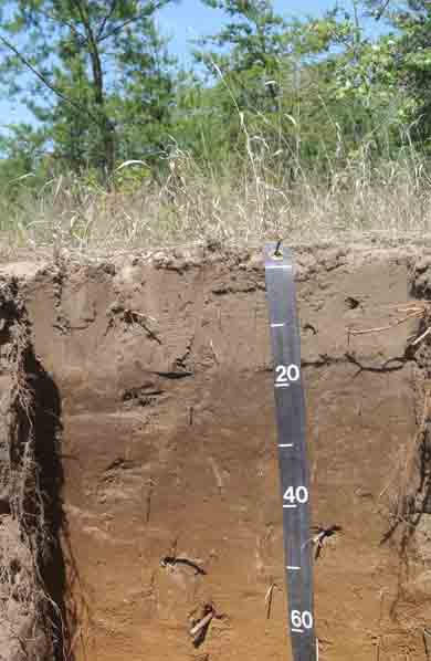 kalkomelanosol